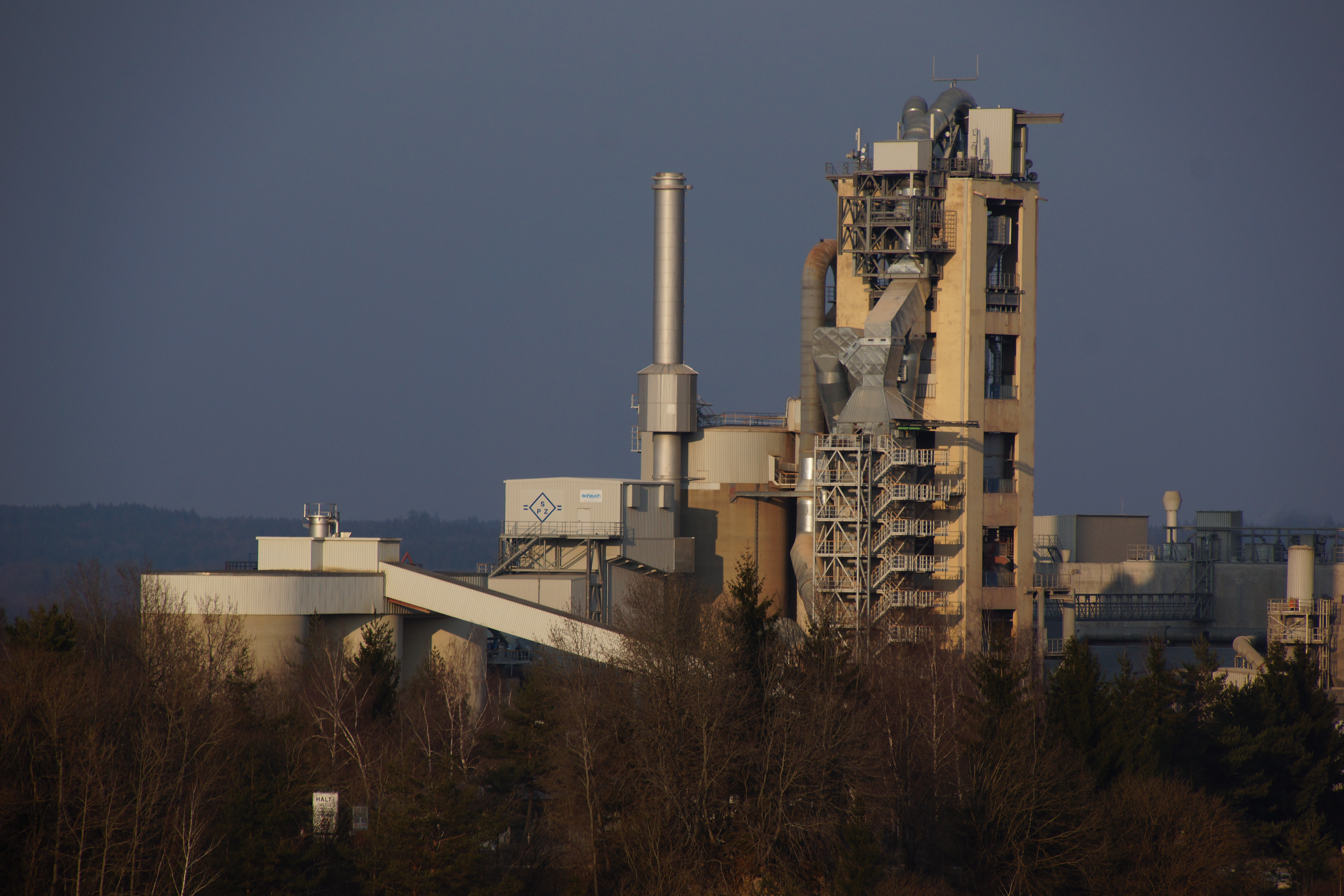 Die Solnhofer Zementwerke / Zementfabrik